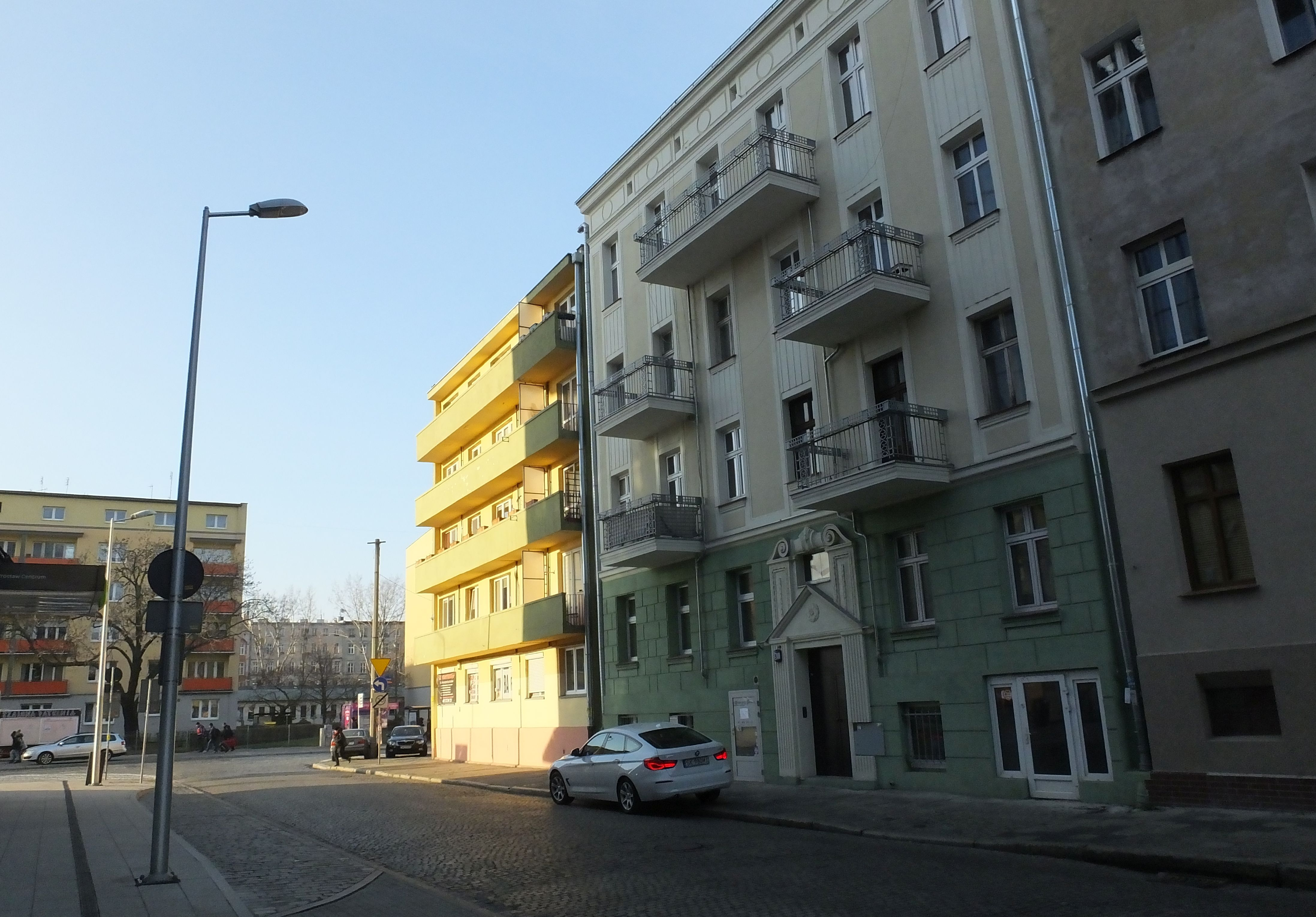 Północna pierzeja placu Konstytucji 3 Maja we Wrocławiu, w głębi ul. Dworcowa